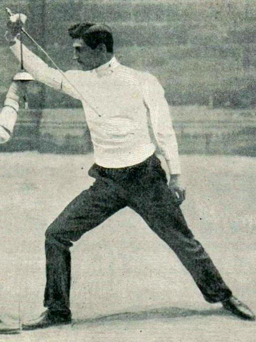 Louis Perrée (amateur) aux JO de Paris 1900.